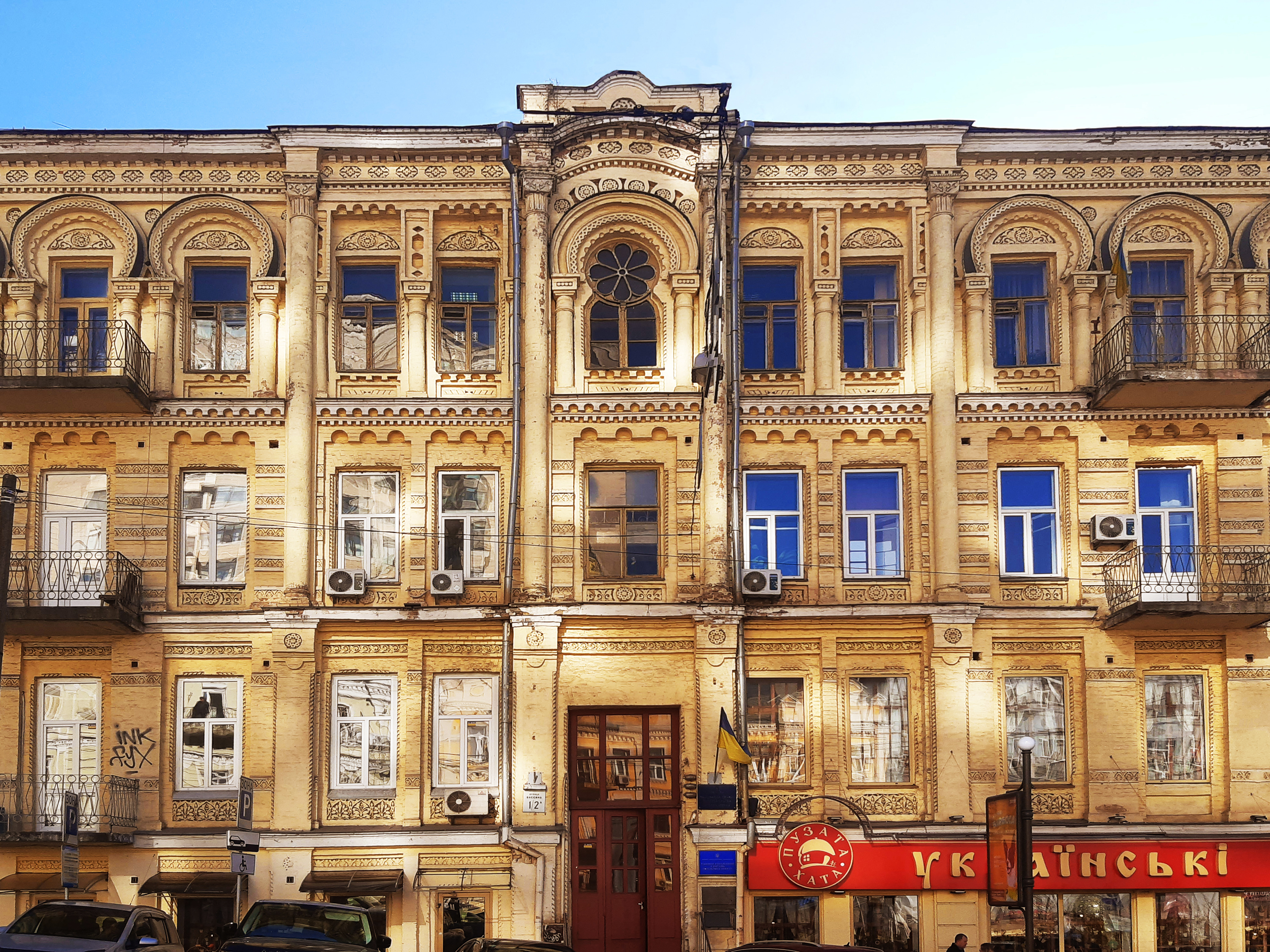 Готель «Пале-Рояль» і прибутковий будинок, Київ, Басейна вулиця, 1/2